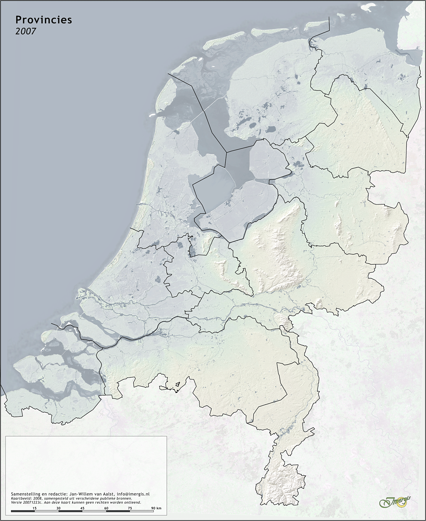 Reliëfkaart van Nederland, 1440 pix